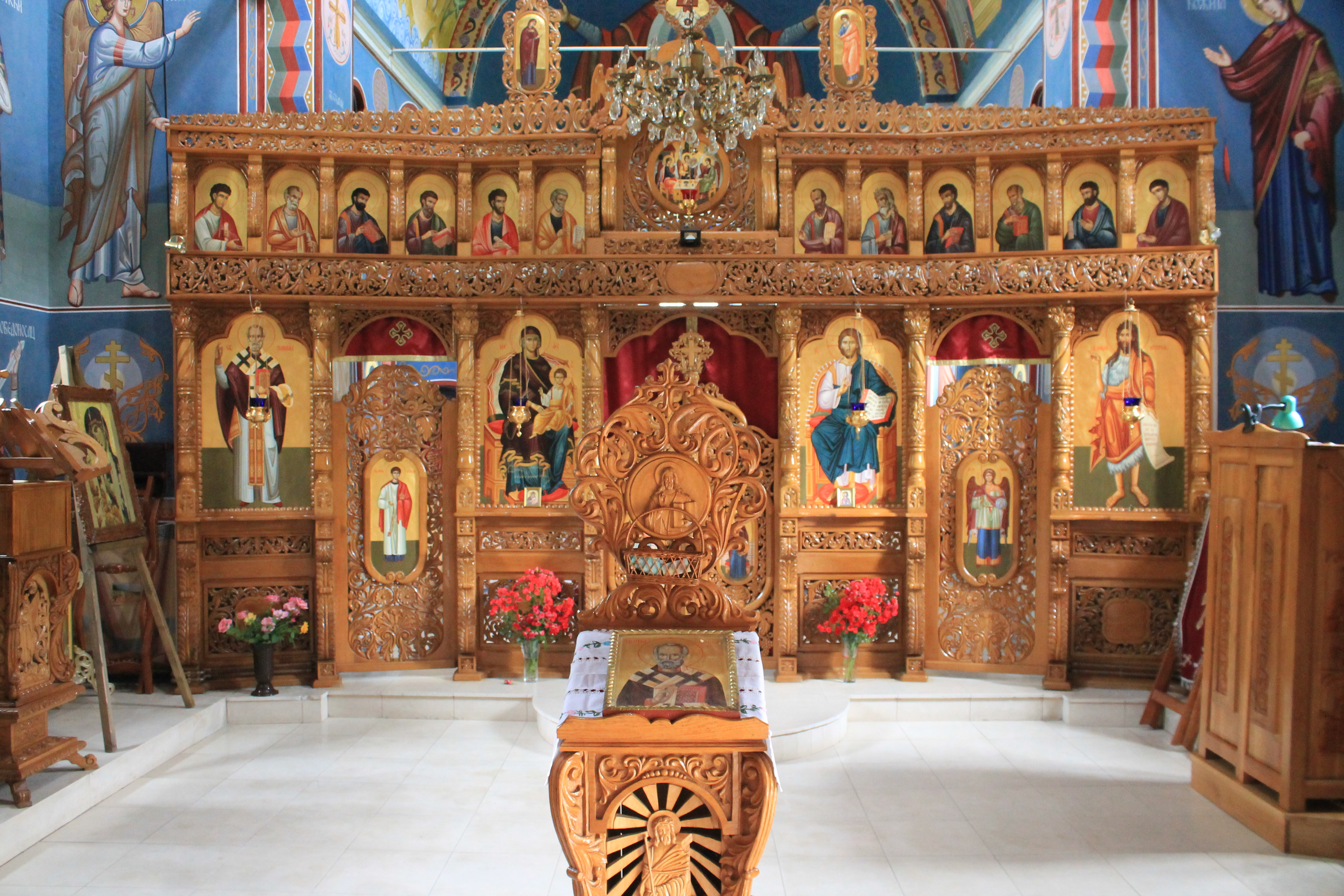 Manastir Đipša, jun 2018.